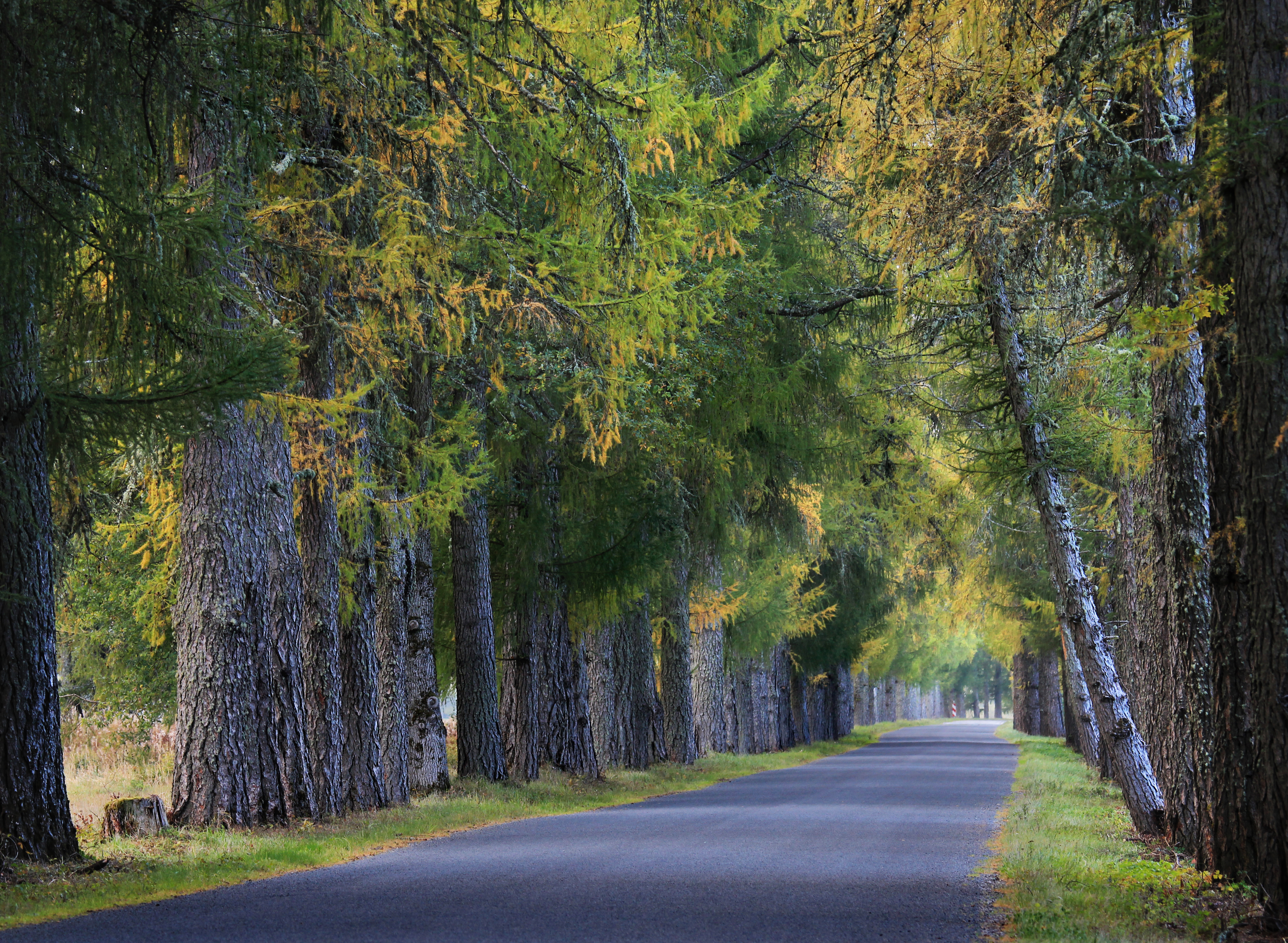 Siberi lehised Vana-Vigalas